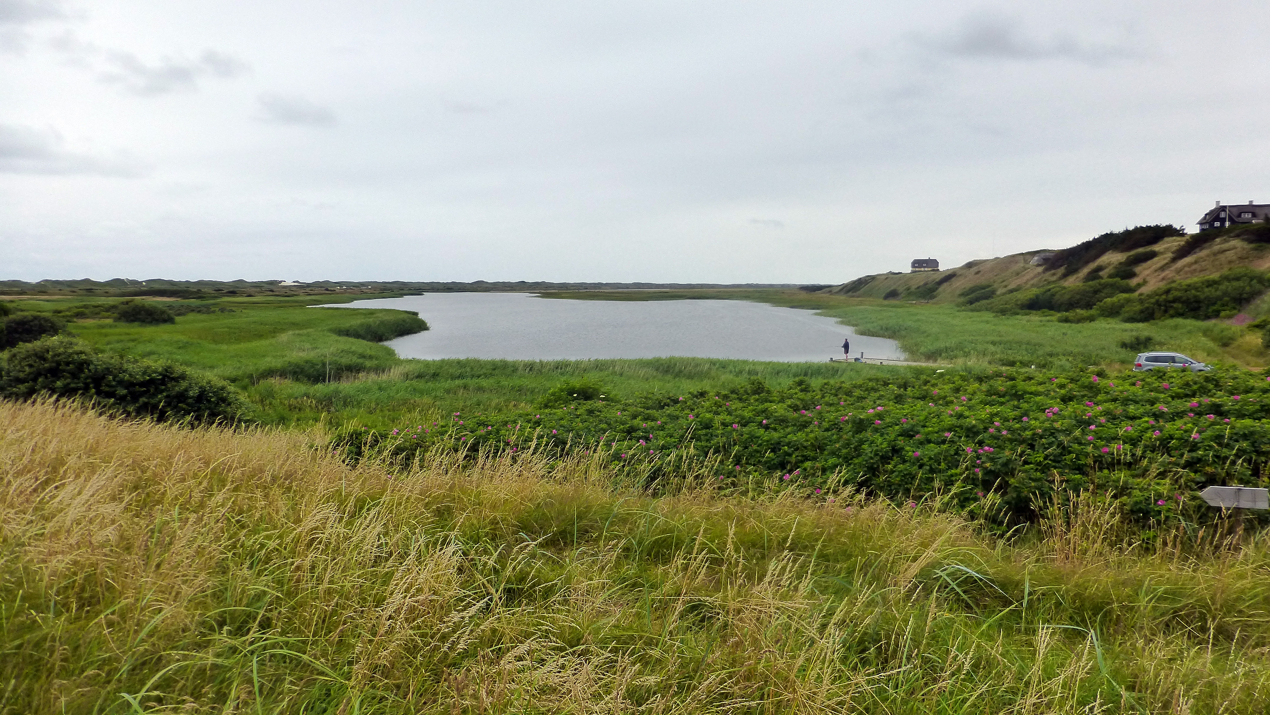 Det tidligere udløb fra Ringkøbing Fjord ved Nymindegab